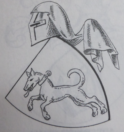 Wappen der Acholtinger